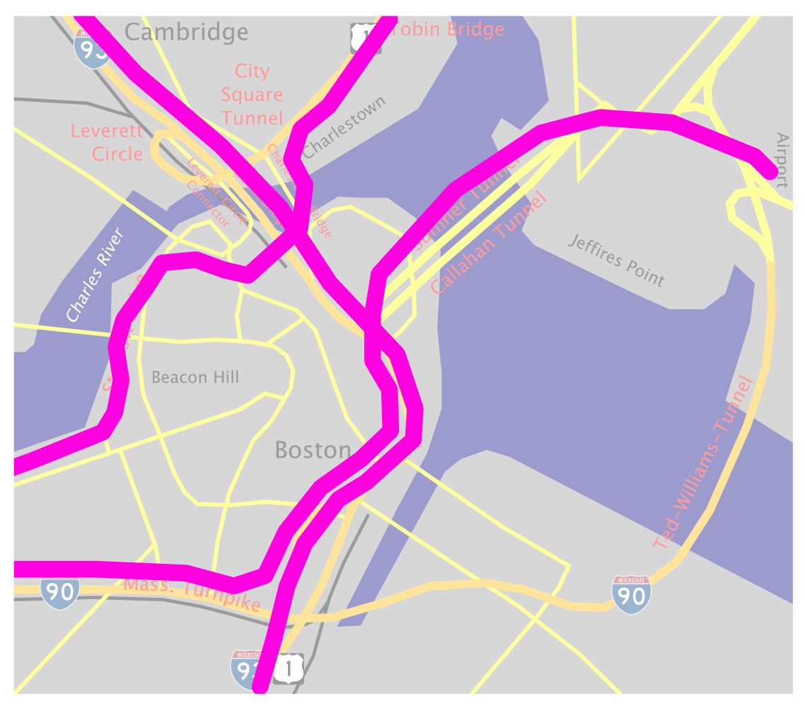 Traffic scheme in Boston before "Big Dig"